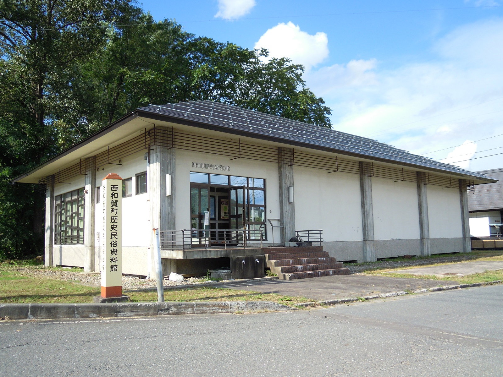 岩手県和賀郡西和賀町にある西和賀町歴史民俗資料館